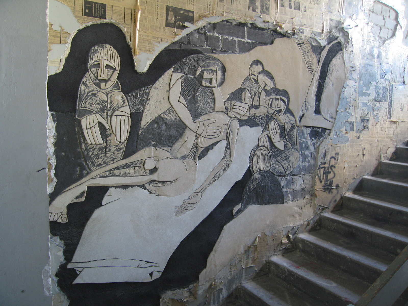 Nadežda Tšernobai vene religioosse kunsti mõjutustega sgrafiito EKA vanas hoones Tartu mnt 1. Lammutatud 2010.Foto: Robert Treufeldt, 3. november 2006